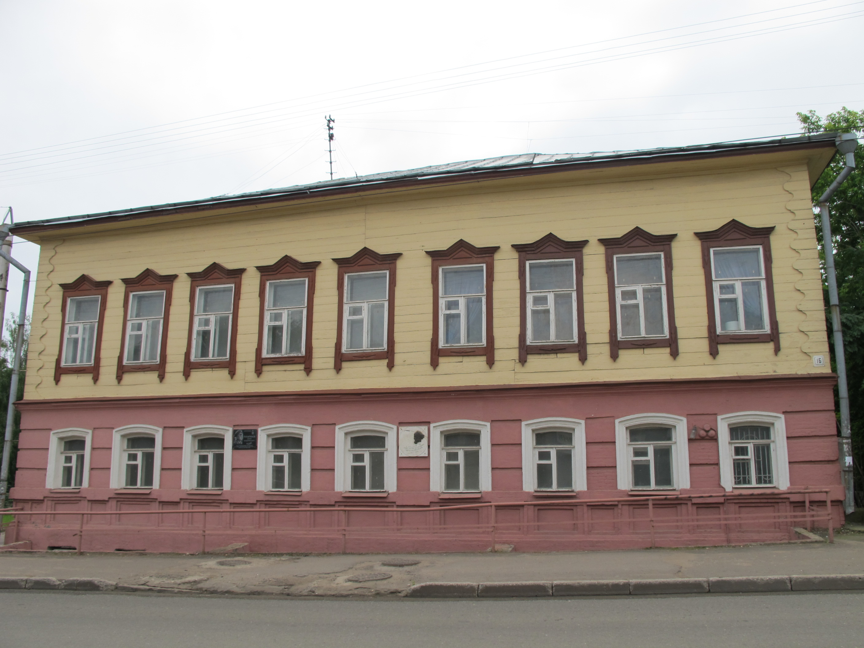 Музей Циолковского в Кирове (в доме, где он жил)